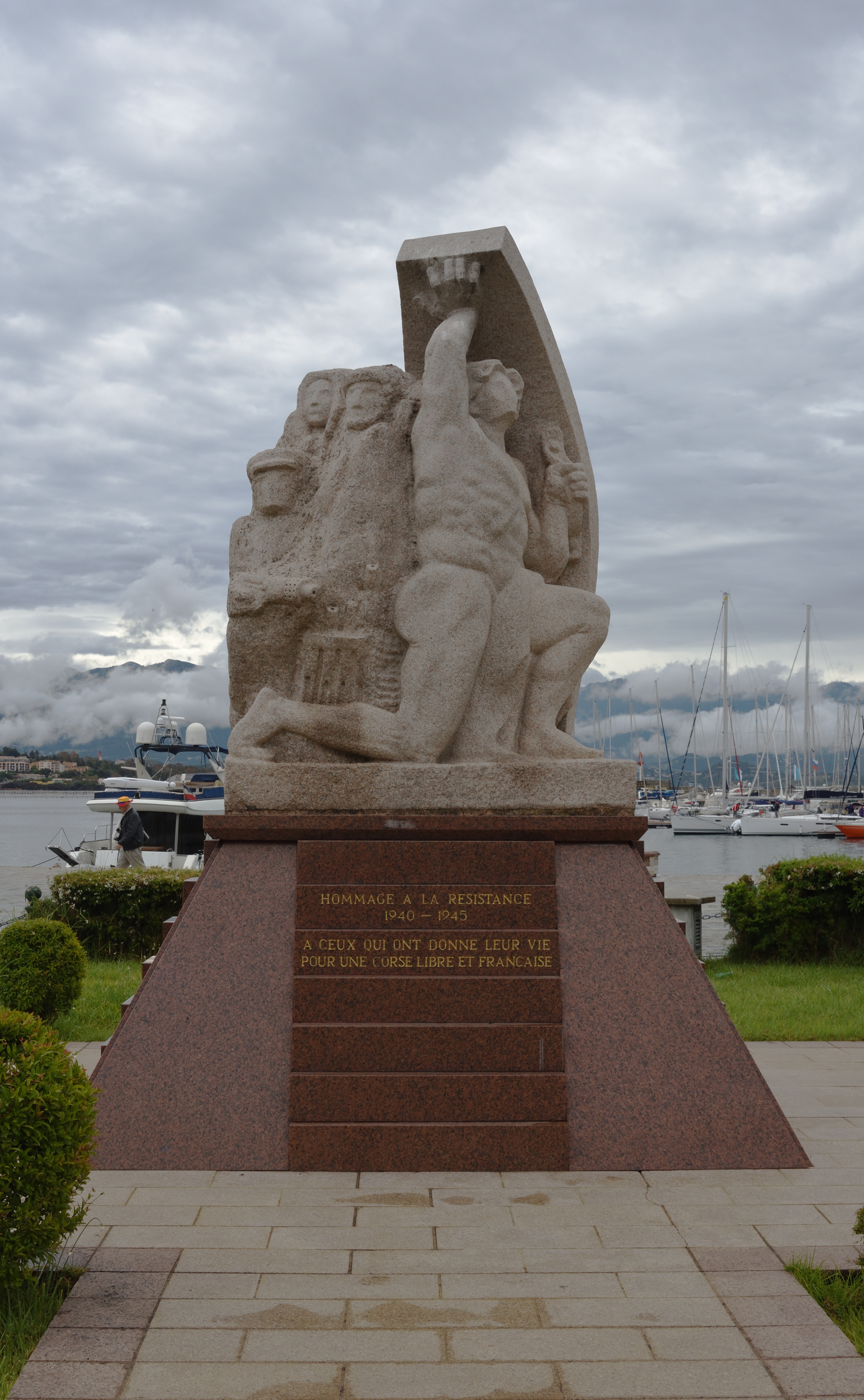 Monument pour la Résistance au port d`Ajaccio en Corse